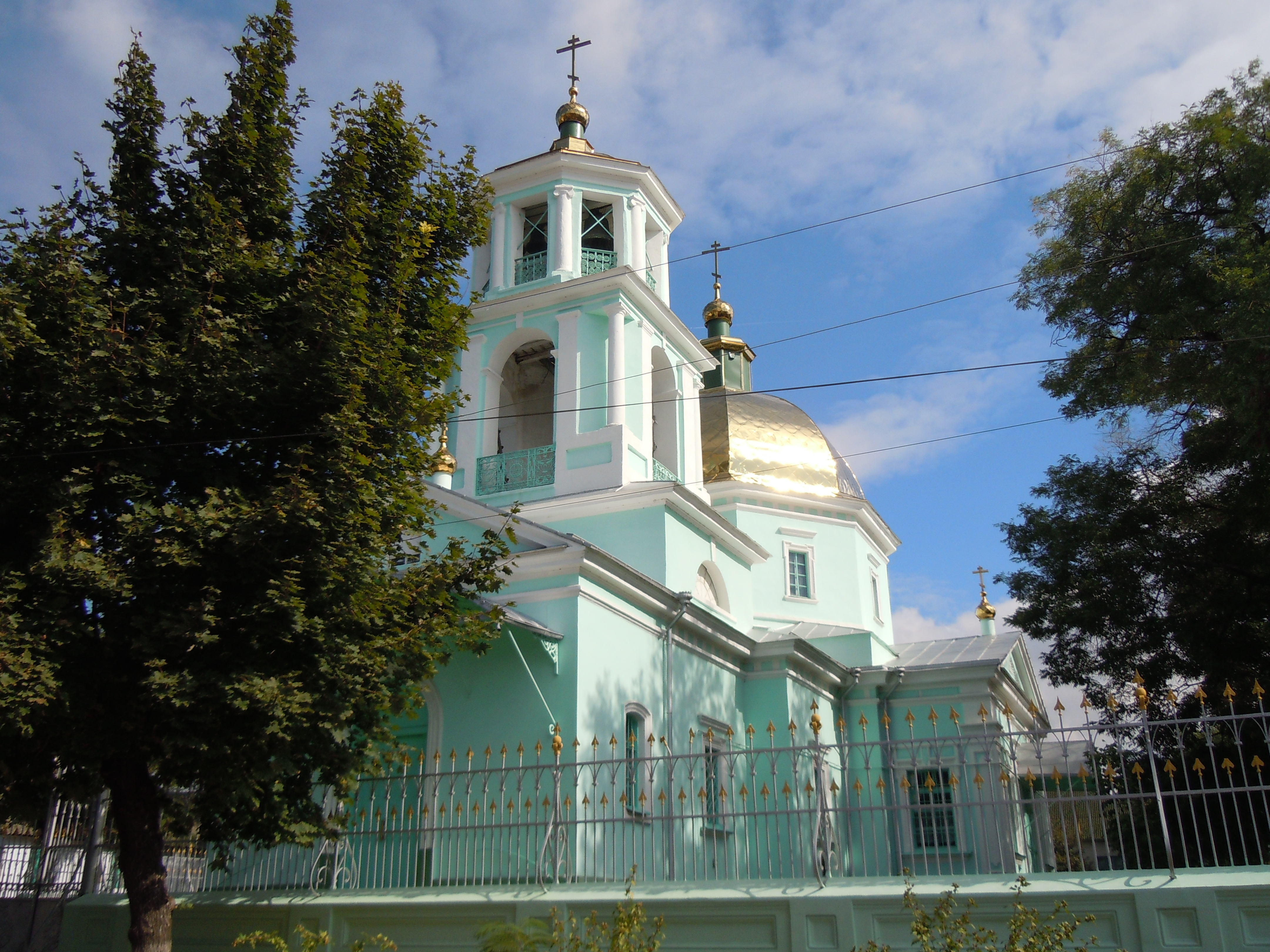 Свято-Миколаївська церква (старообрядська), Ізмаїл, вул. Дзержинського, 124